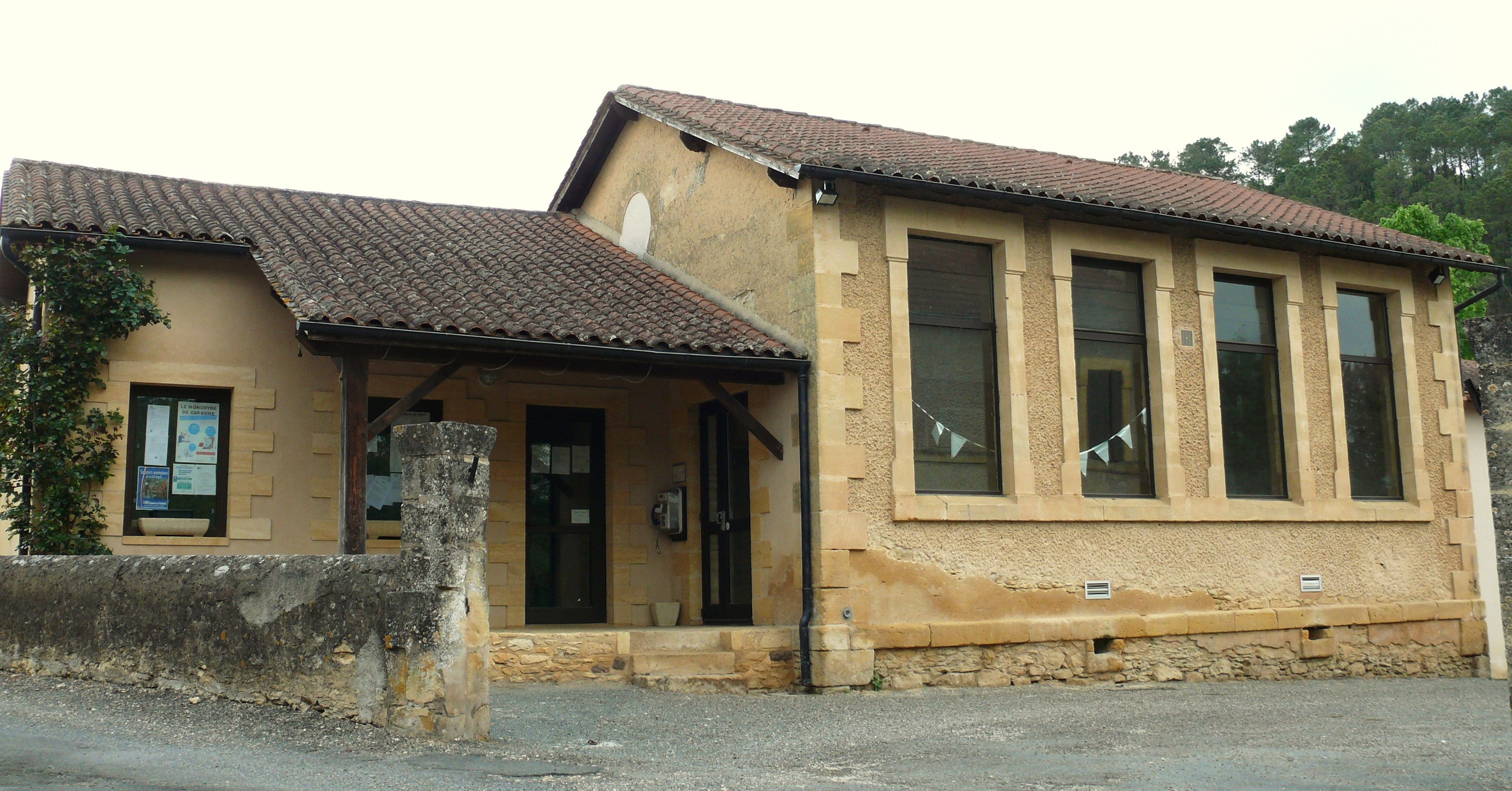 Larzac - Mairie dans l'ancienne école